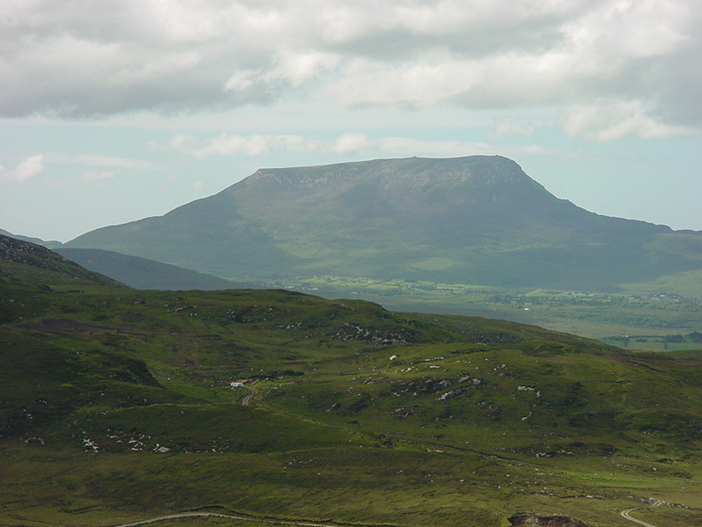 Muckish